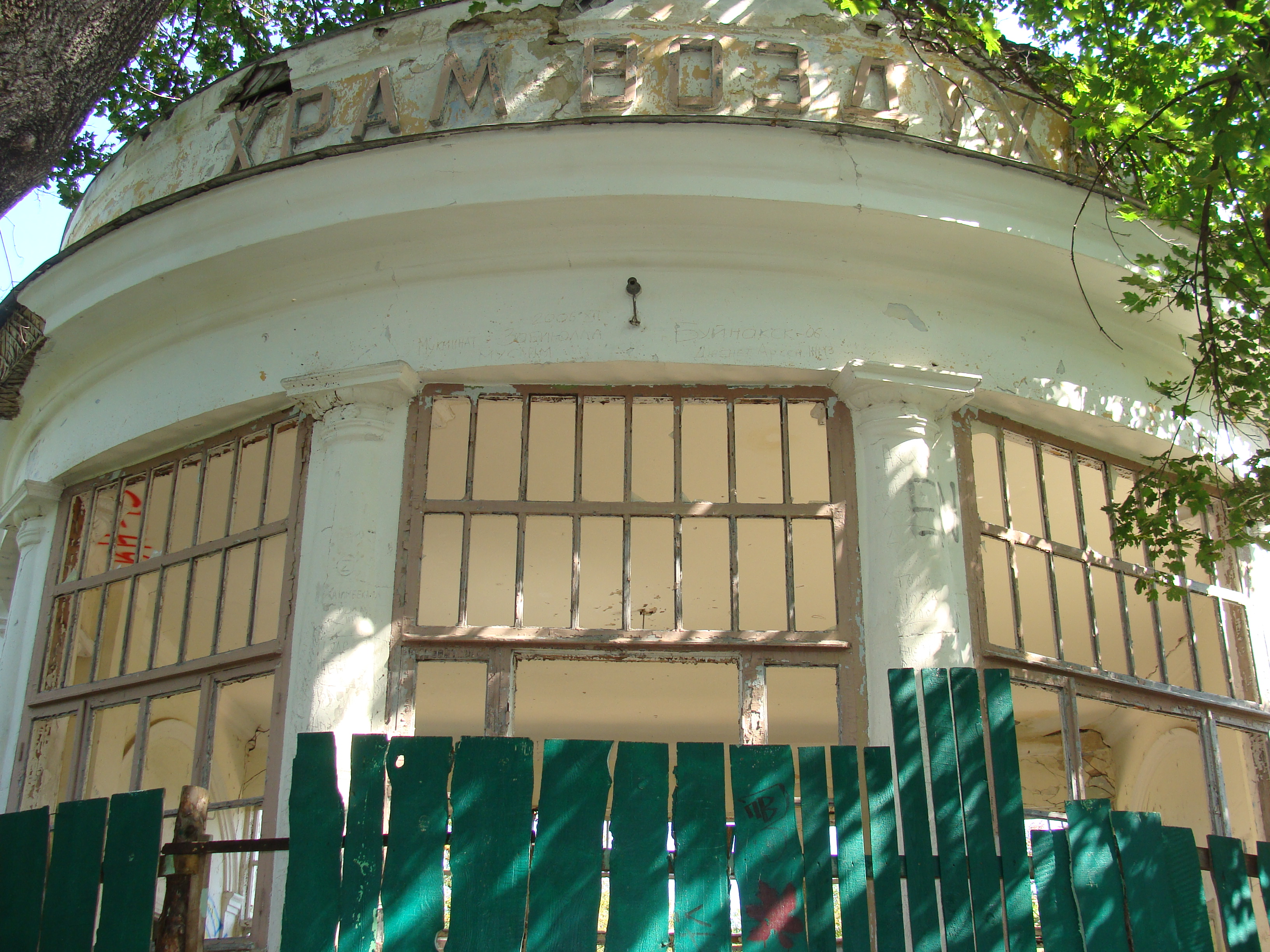 Кисловодск, Кисловодск This image is related to the protected area of Russia number 2600075